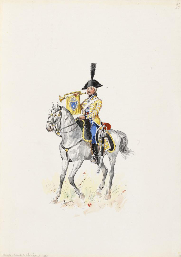 Trompette des Hussards de Chamborant en petite tenue en 1787